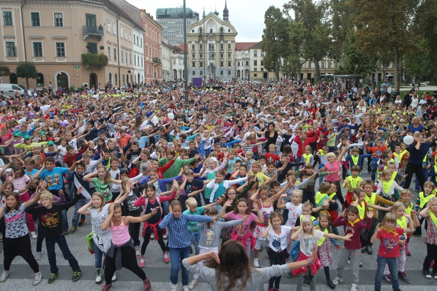 Children dance in a square during EMW 2014 in Ljubljana, Slovenia.